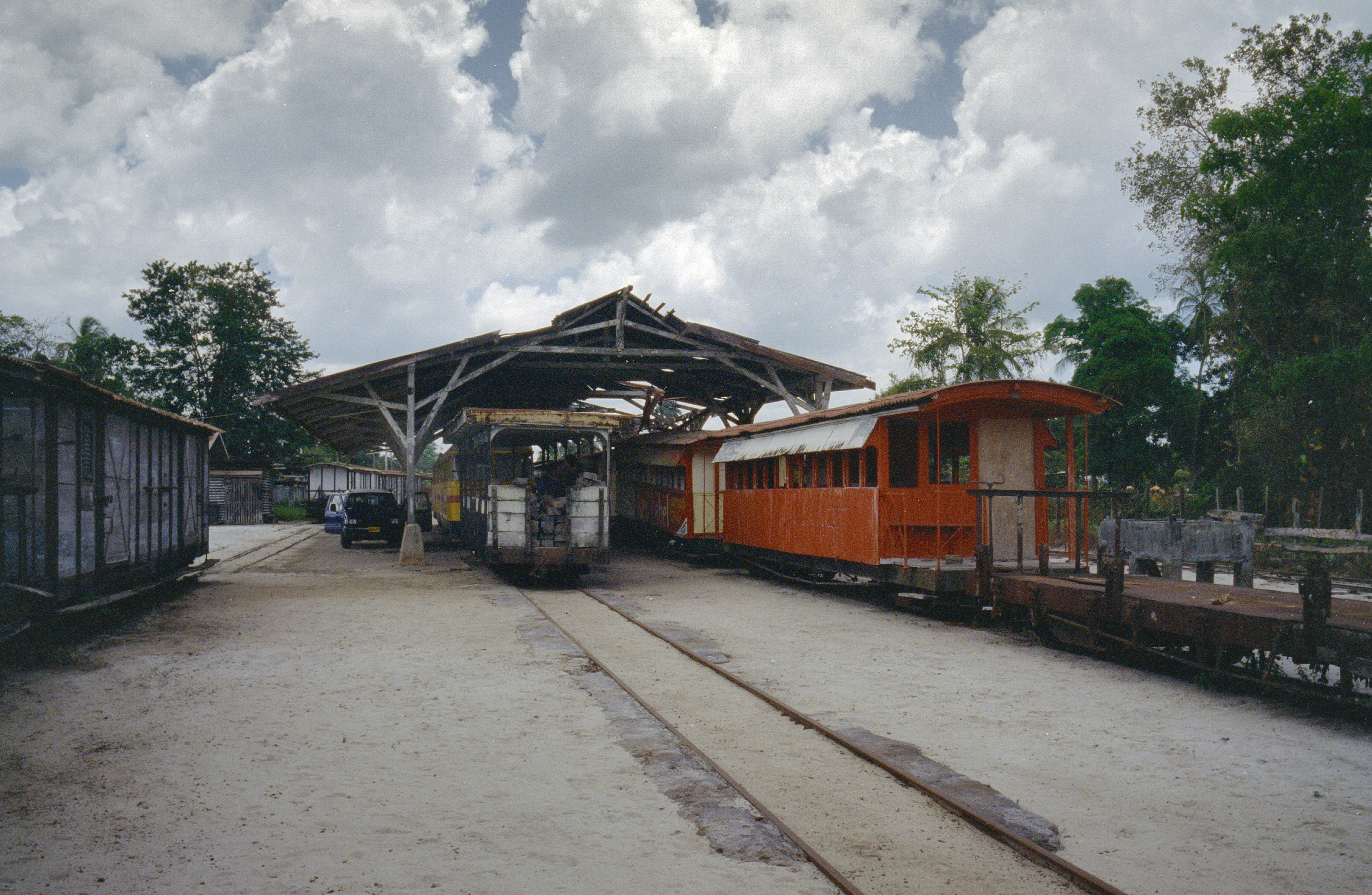 Voormalig station: Overzicht voormalig station (opmerking: Suriname Reis Loek Tangel)